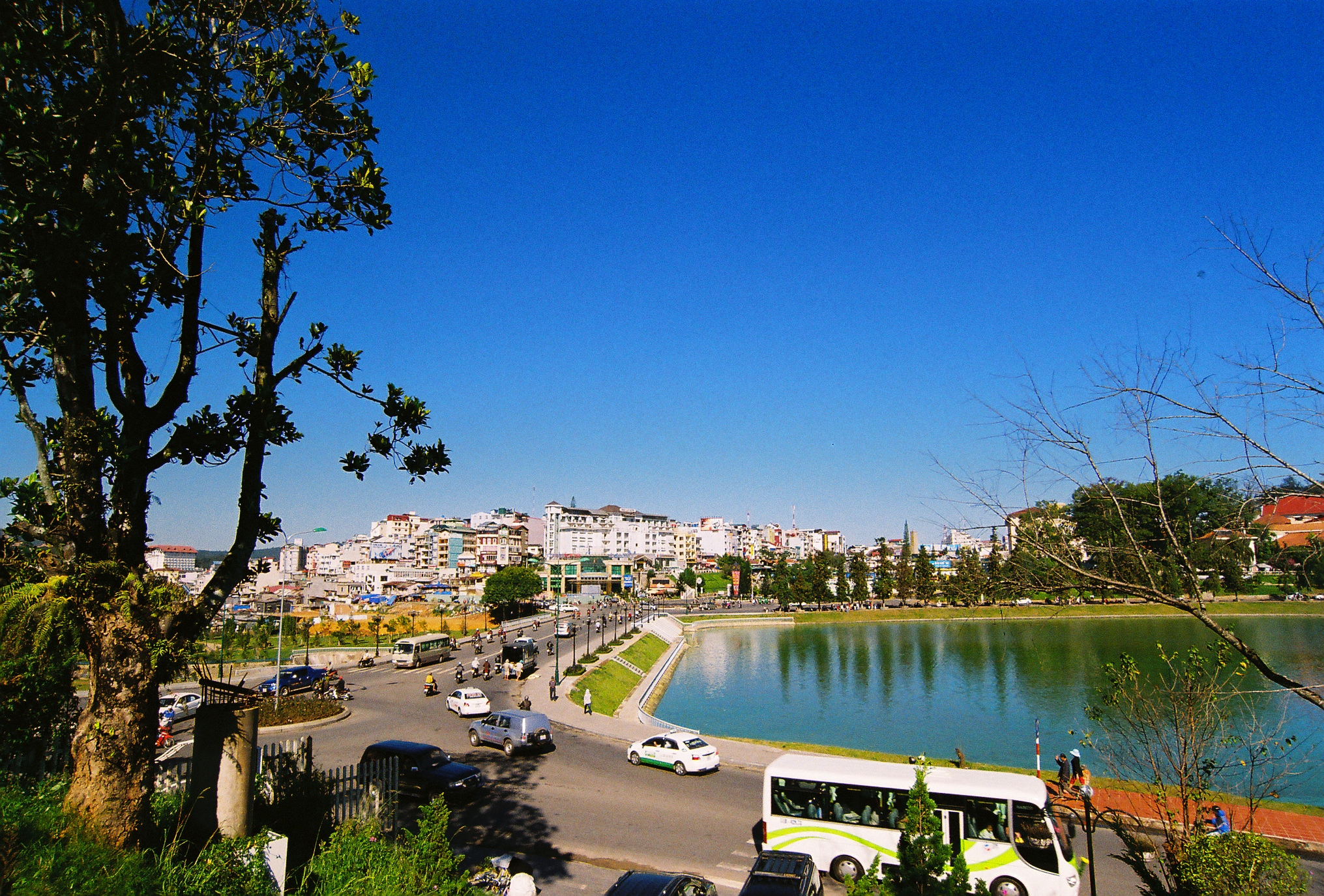 Cầu Ông Đạo, Đà Lạt